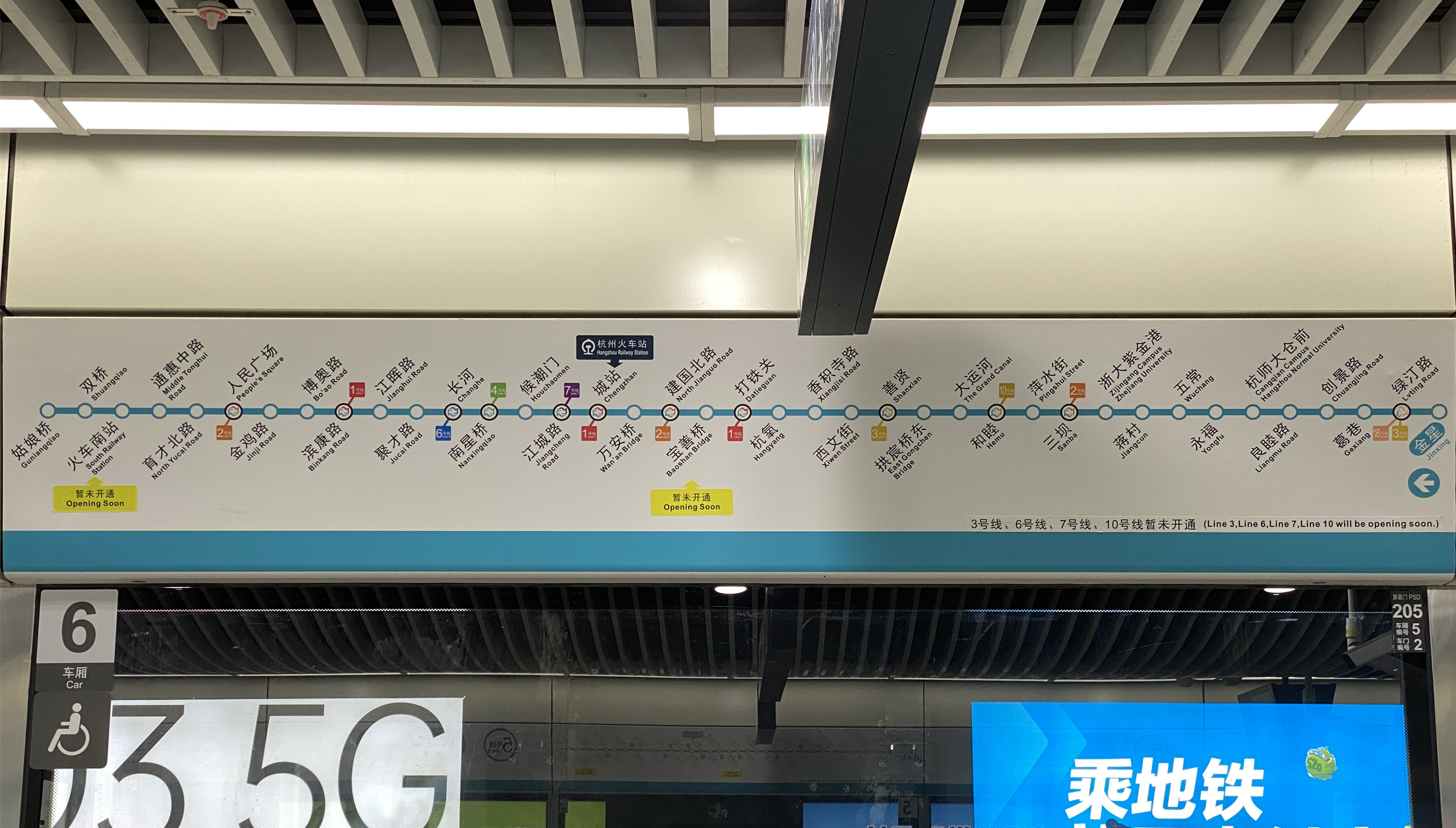 5号线全线线路图